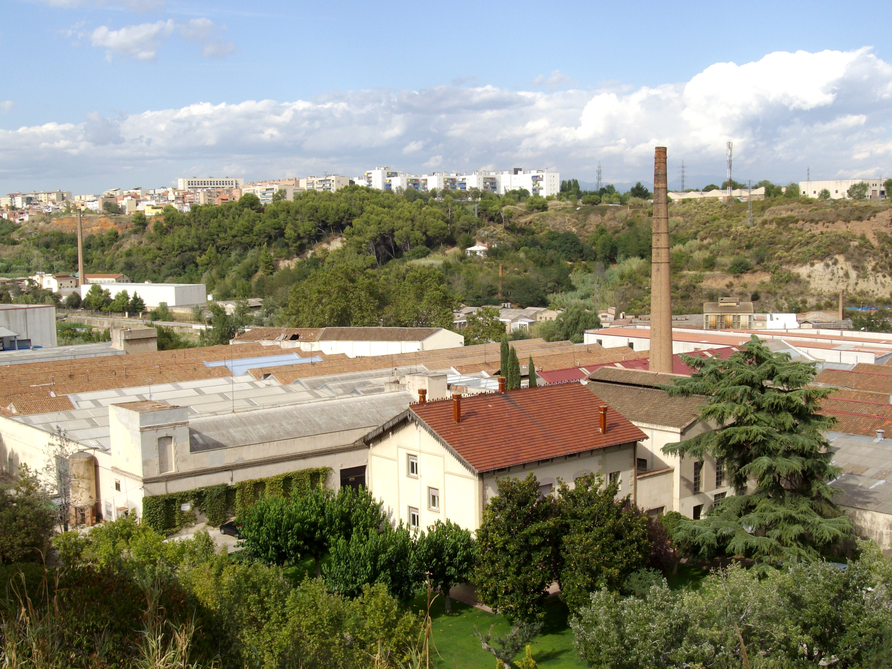 Chimeneas de la parte baja del río Ripoll, Sabadell. De izquierda a derecha pueden verse las chimeneas de Cal Grau, Timsa, Can Quadres y Auxiliar Industrial Sabadellense.